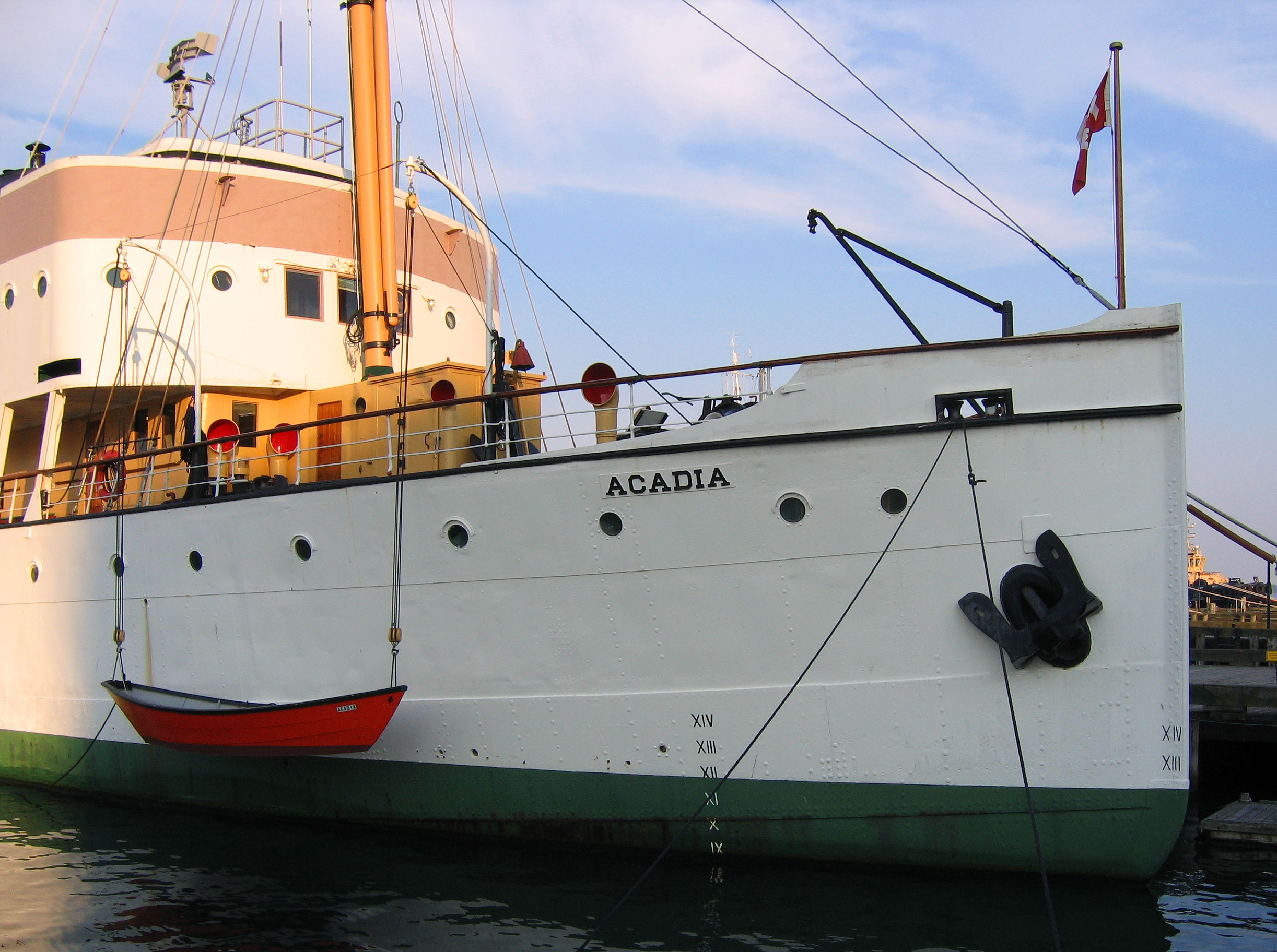 CSS Acadia, Halifax, Nova Scotia, Canada